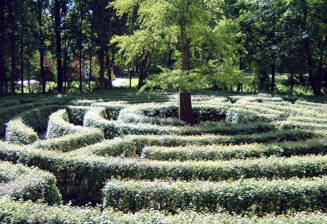 Labyrinth (Irrgarten) im Park Schönbusch, einem englischen Garten bei Aschaffenburg